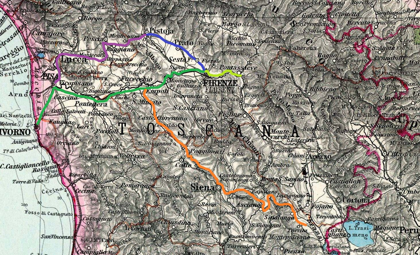 L'immagine è la rielaborazione di una porzione del File:Stielers Handatlas 1891 23.jpg già presente su Commons. Interessa l'area della Toscana